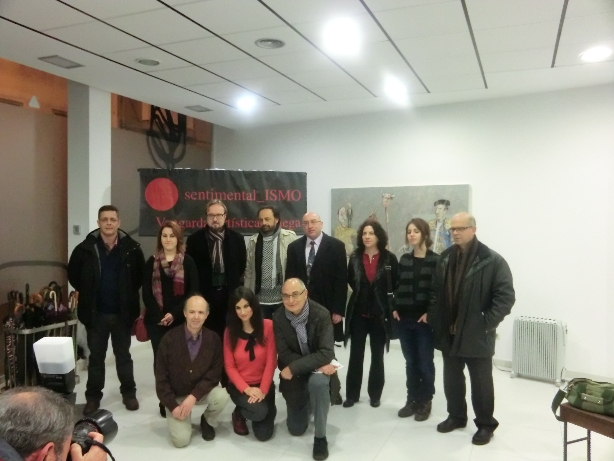 SENTIMENTALISMO autoras e autores